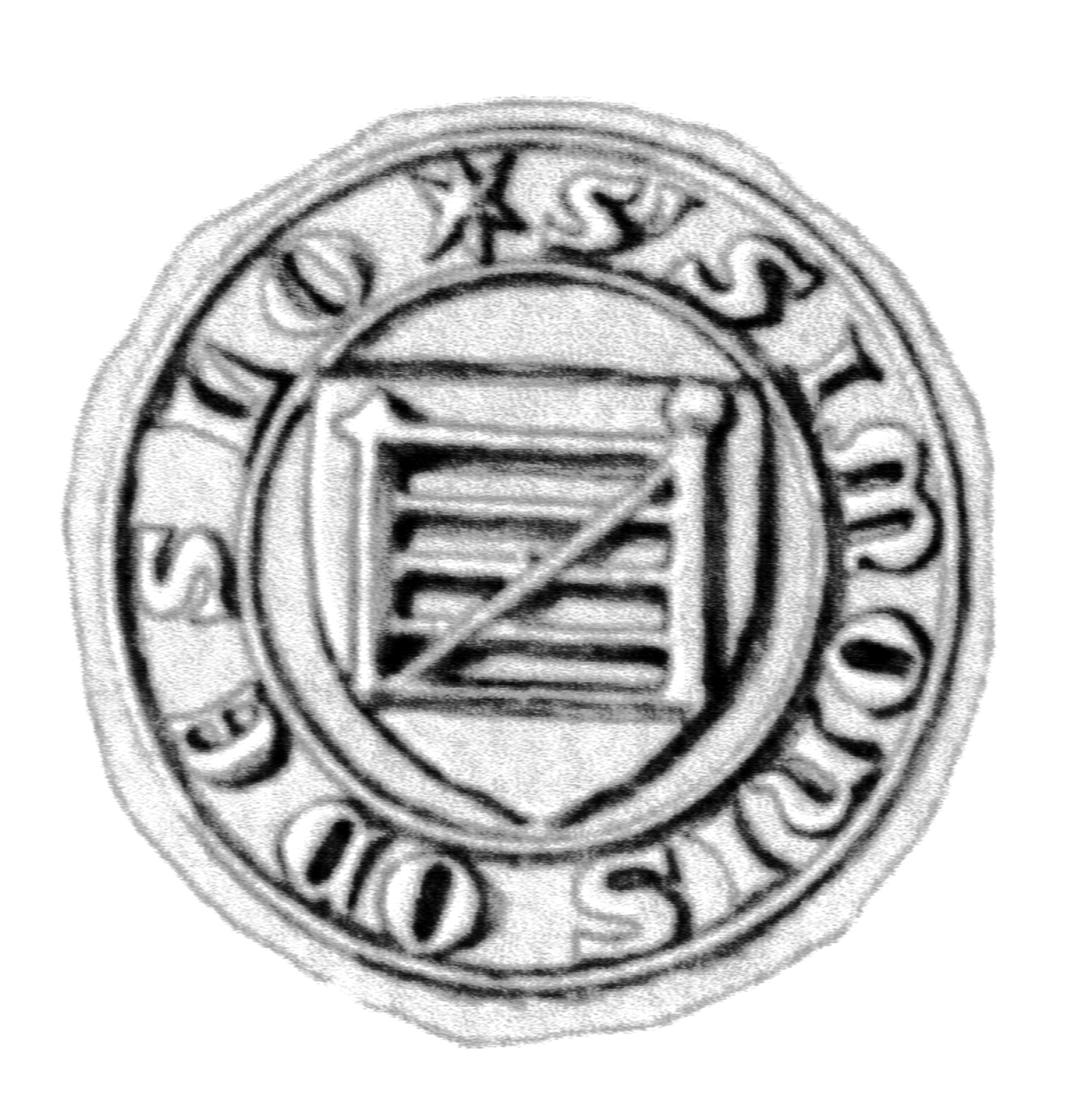 Siegel des Ratsmannes Simon Odeslo. Das Siegel stammt aus der Zeit um 1411. Siehe Emil Ferdinand Fehling: Lübeckische Ratslinie, Nr. 448 (Simon Oldesloe).